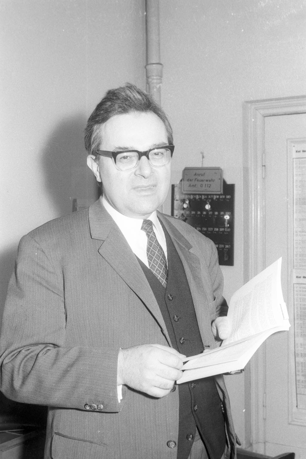 Der Politikwissenschaftler und Historiker der Universität Mainz wurde als Sachverständiger zu einem Prozess vor dem Kieler Schwurgericht hinzugezogen. Den Angeklagten wurde die Ermordung von Juden im weißrussischen Mogilew während des 2. Weltkrieges vorgeworfen.